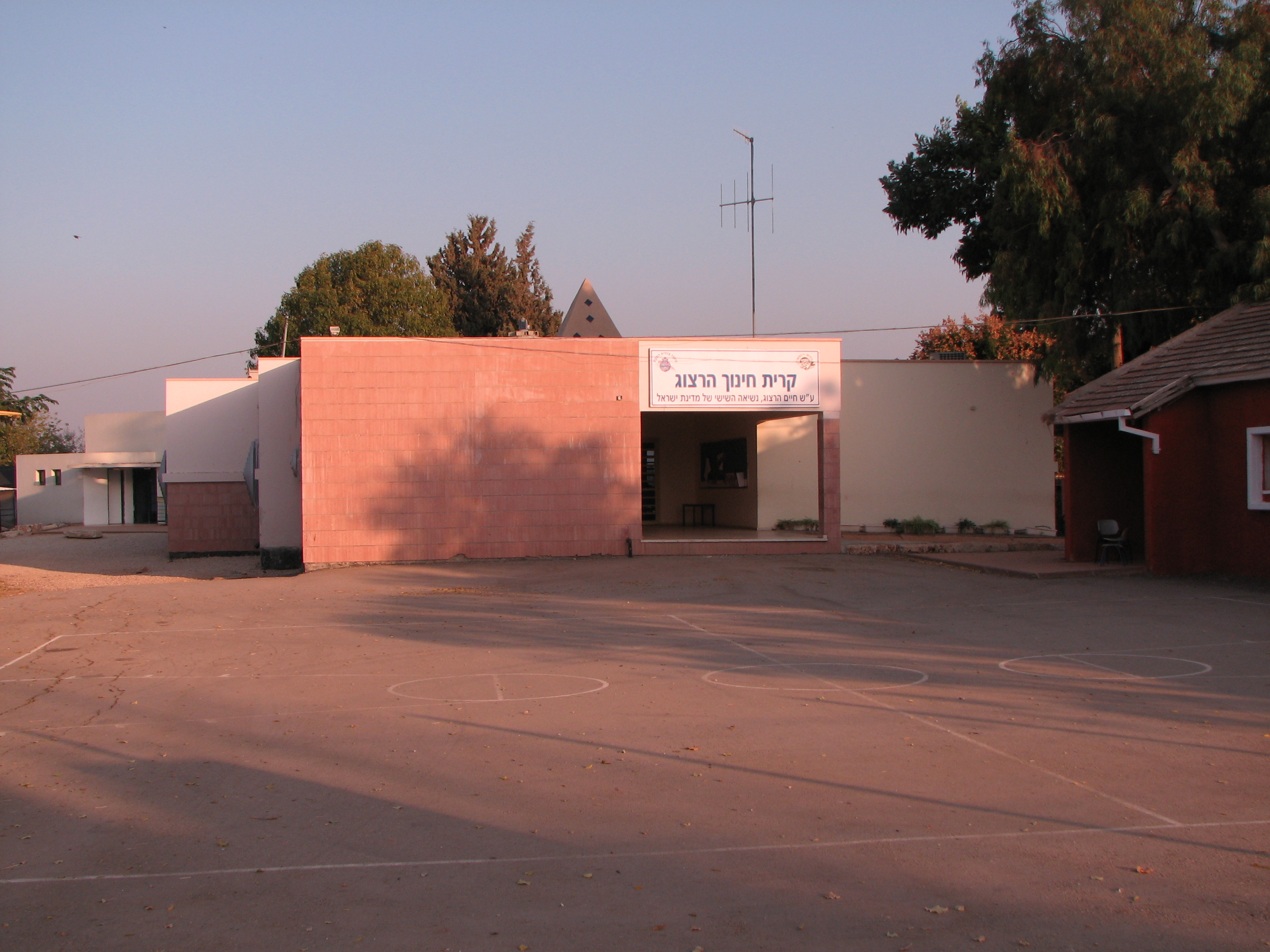 קרית חינוך במרכז חבר